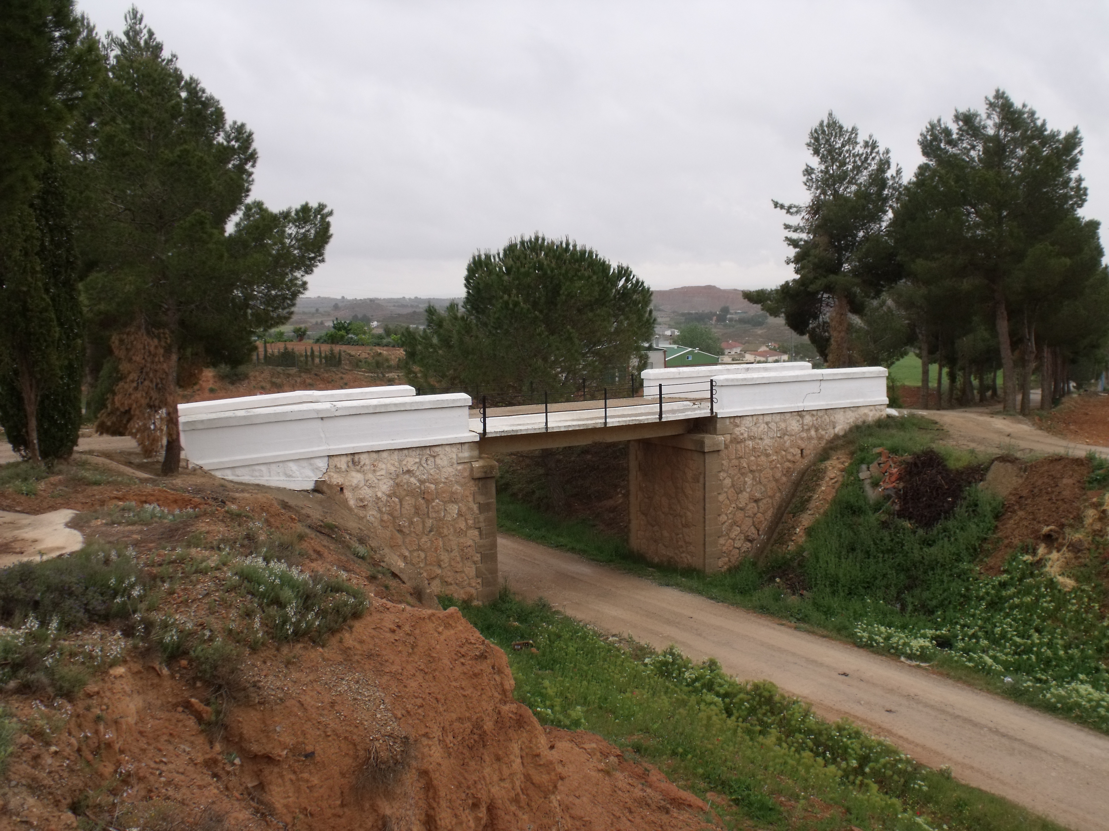 Puente del ferrocarril de la vía Úbeda-Utiel utilizado para acceder al cementerio de Fuentealbilla